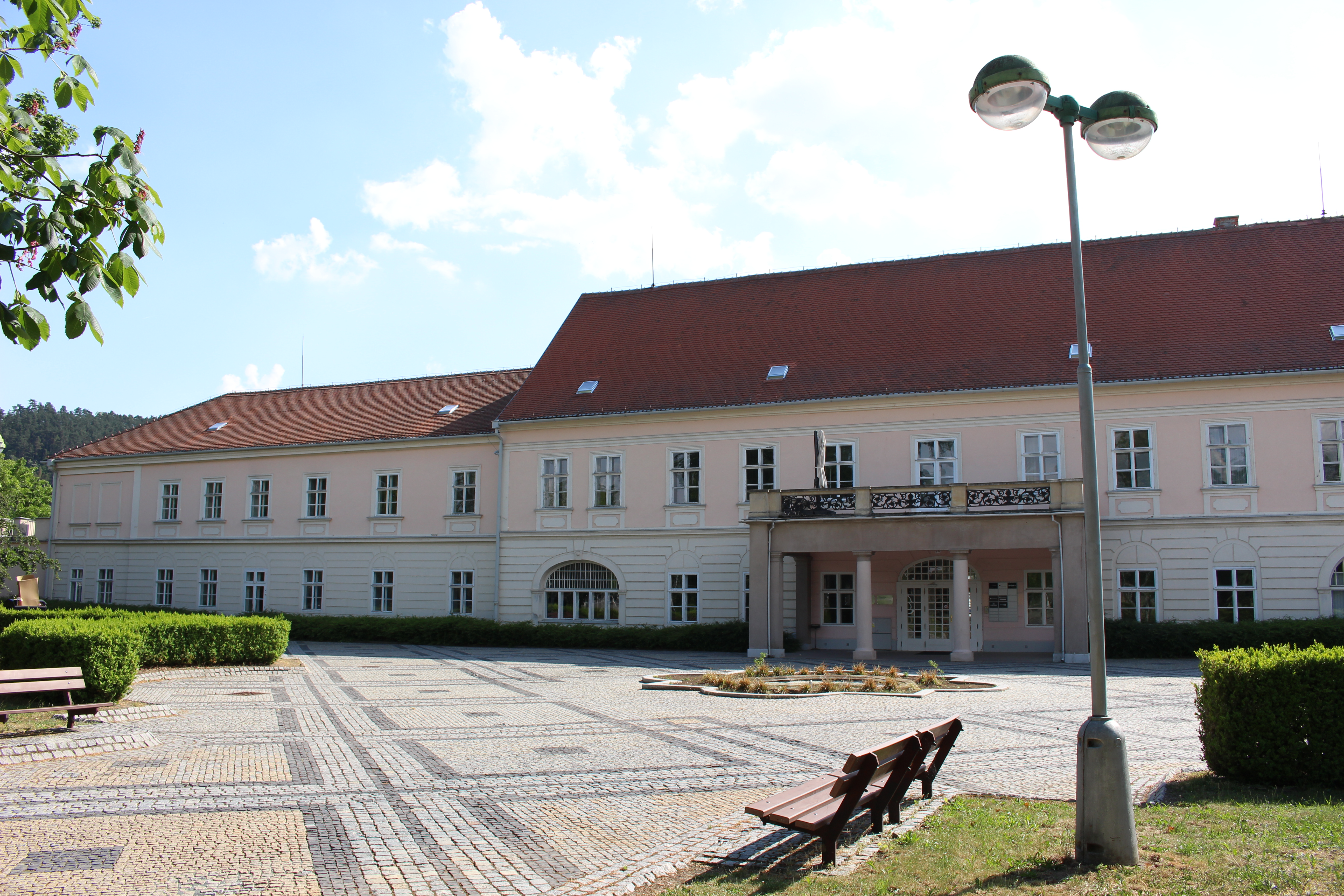 Bauerův zámeček, Brněnské výstaviště